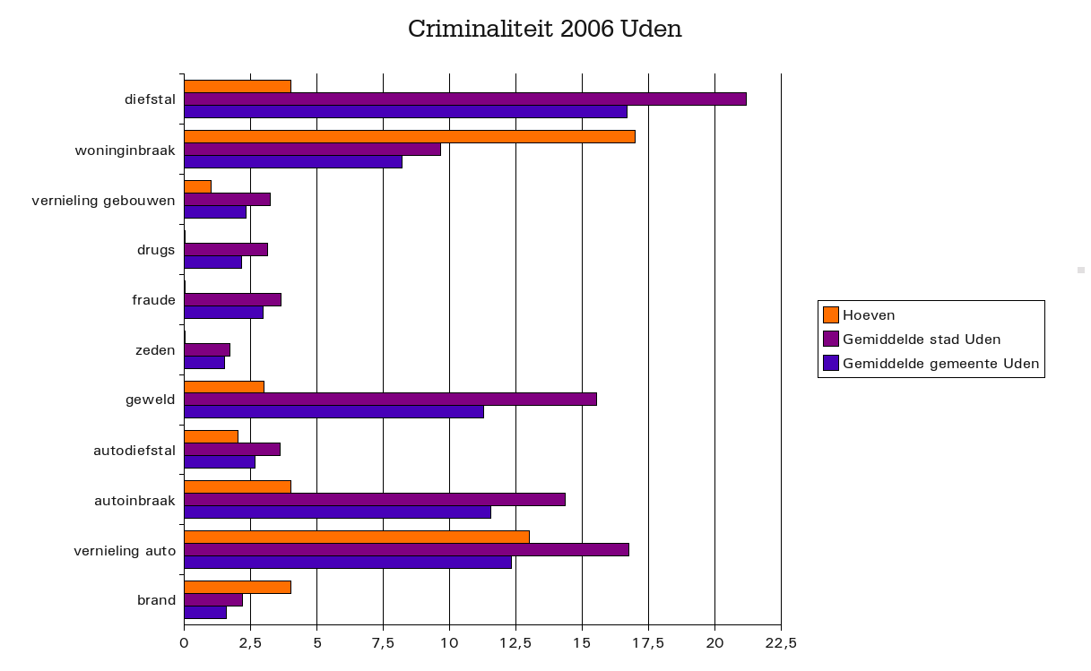 Criminaliteitcijfers in Uden Hoeven (2006), Noord-Brabant, The Netherlands